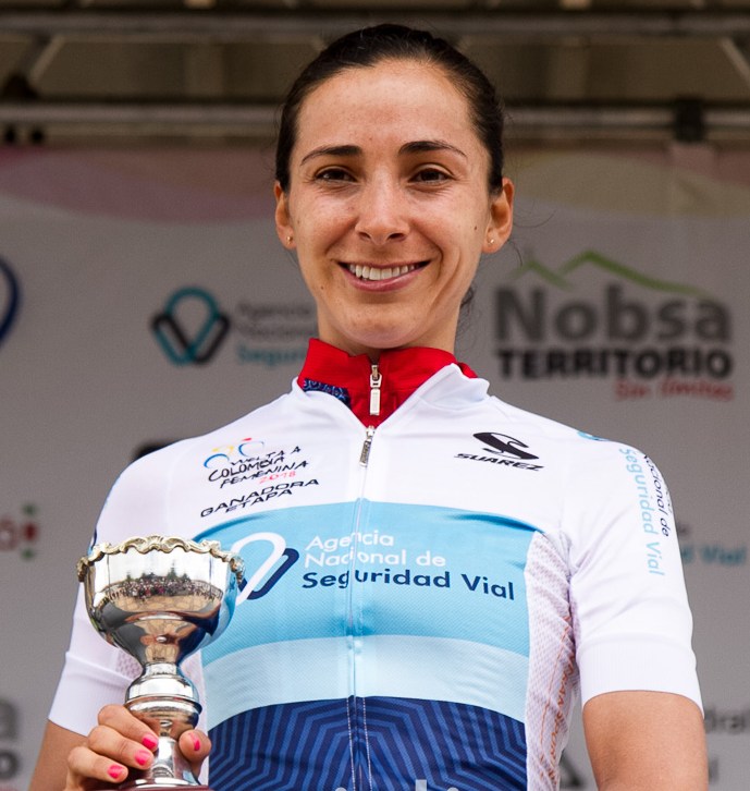 Marcela Prieto en el podio como ganadora de la cuarta etapa de la Vuelta a Colombia Femenina 2018